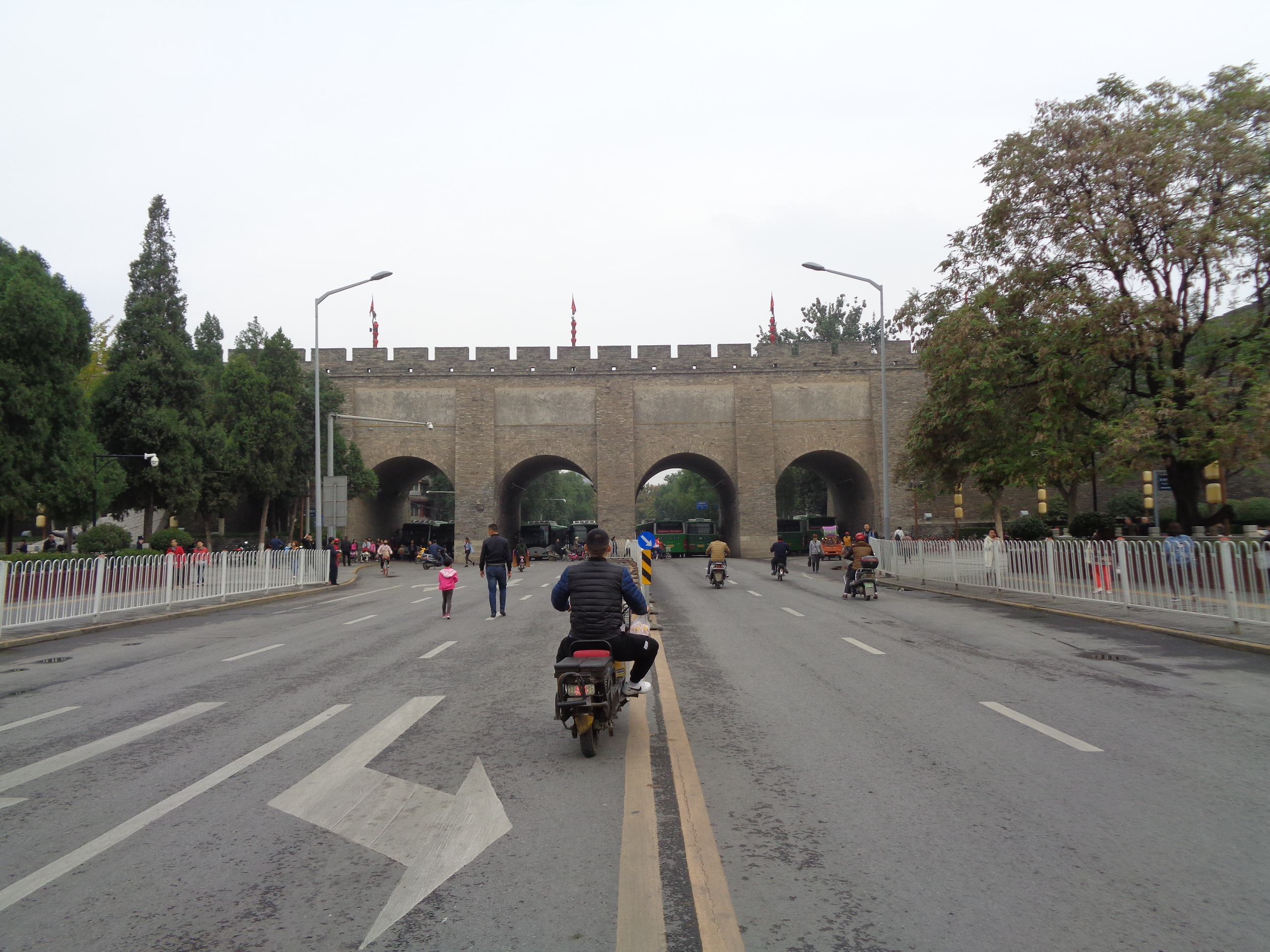 西安市碑林区雁塔北路和平门附近，有雁塔北路和环城南路，此时是西安国际马拉松